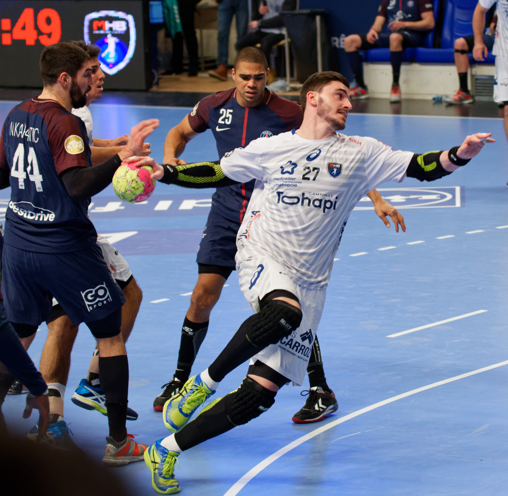 Rencontre de championnat entre le PSG et Montpellier. A Coubertin, le 1er mars 2018.